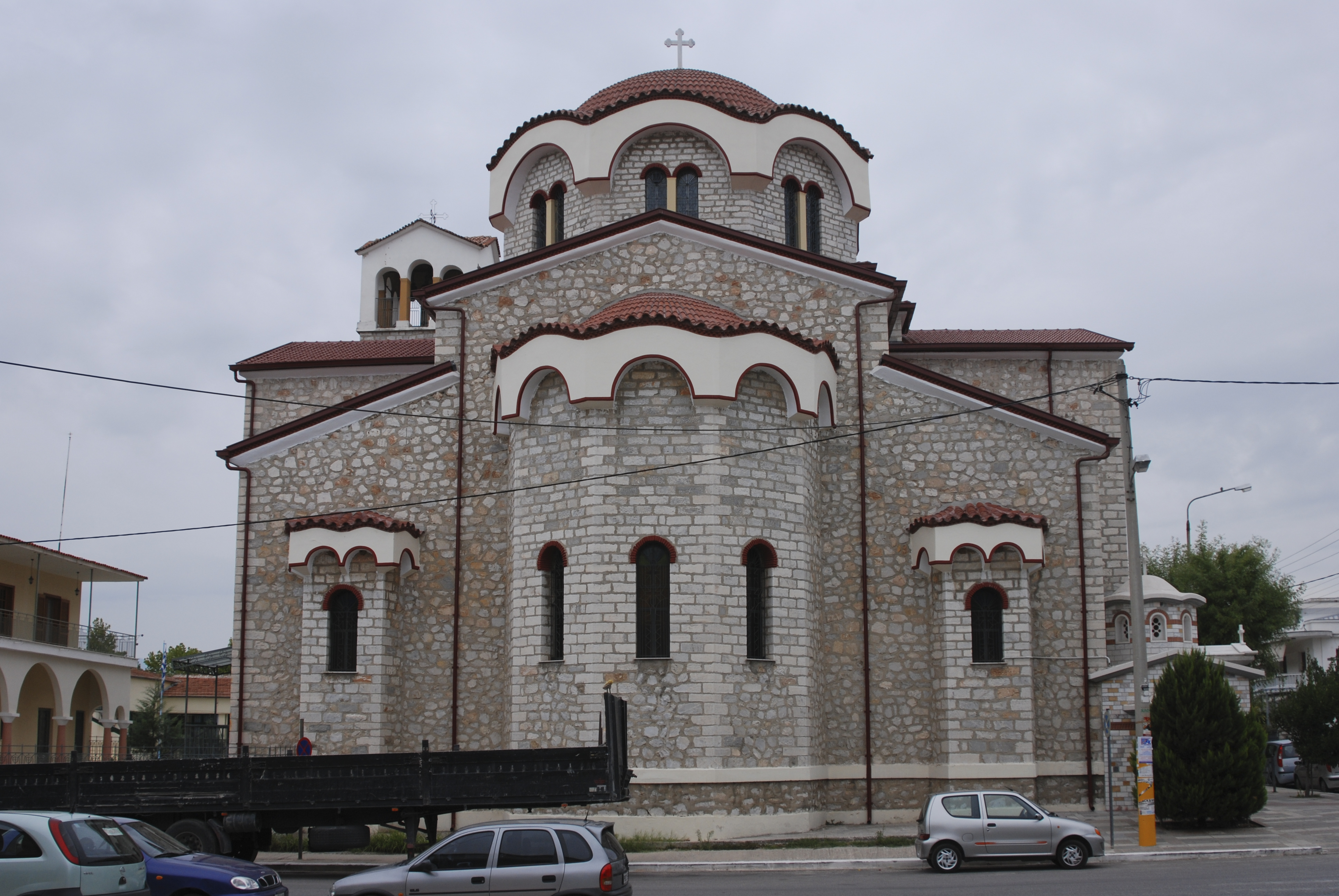 Църквата Свети Пантелеймон, Драма, Гърция.